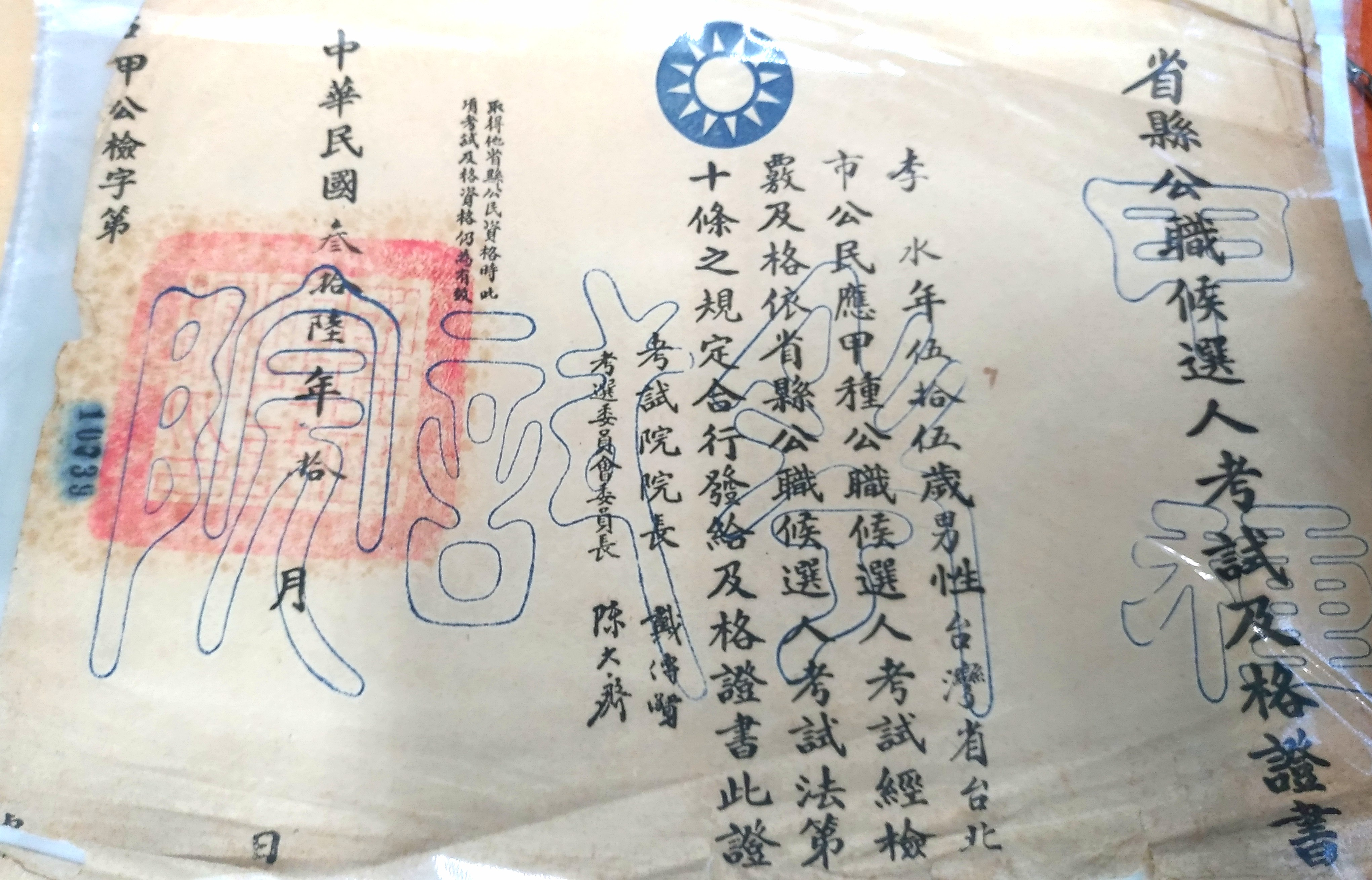 李水（民國前19年10月22日-民國57年8月12日）。 甲種公職候選人考試及格。曾任臺北市第七信用合作社理事主席、臺北市古亭區合作社理事、城南住宅公用合作社理事、臺北工業股份有限公司董事、大豐行營造廠負責人、臺北區營造工業同業公會顧問、臺北市國都戲院股份有限公司董事長。 民國57年8月12日病逝。總統蔣中正特頒「樂善流徽」輓額，由谷正綱擔任治喪委員會主任委員，蔣緯國、黃啟瑞、張祥傳擔任副主任委員。 79年被繼承人李水之遺產稅訴訟事件，曾創下有史以來最大金額之國庫額外收入（土地抵繳遺產稅）紀錄。